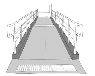 ภาพแสดงทางลาดที่มีขอบกันตกและมีพื้นผิวต่างสัมผัสชนิดเตือนก่อนถึงทางลาดป้องกันอุบัติเหตุเผื่อการใช้งานที่ผิดพลาดได้